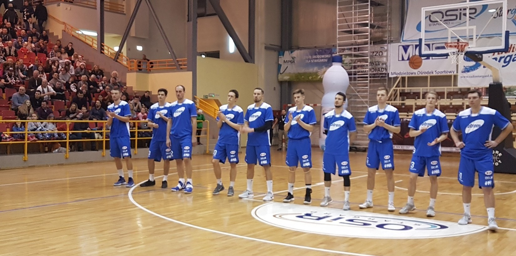 Biofarm Basket Poznań